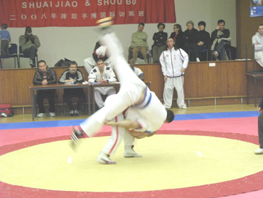 Tecnica di proiezione durante un combattimento sportivo di Shou Bo